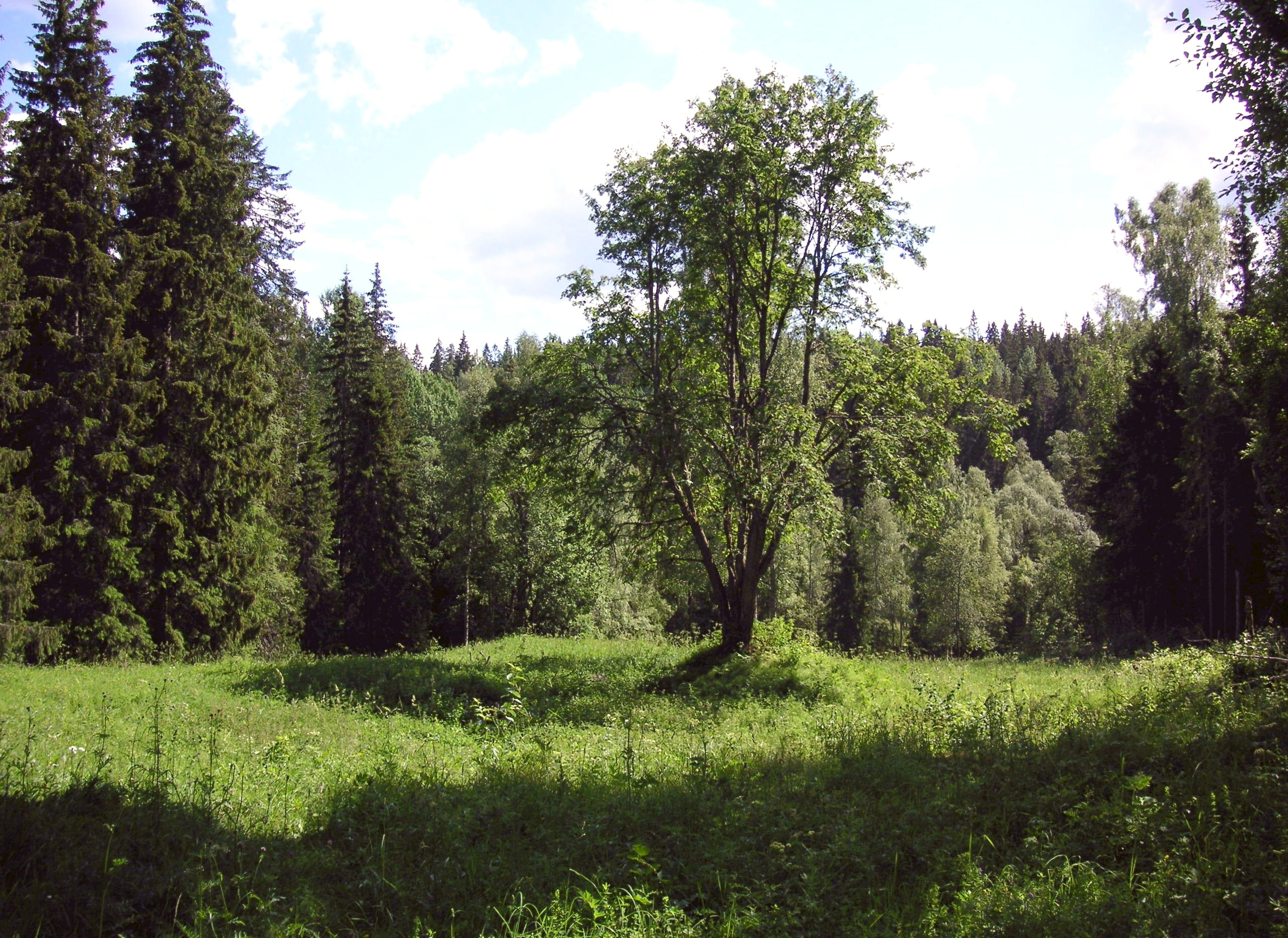 Jätturns naturrreservat i Ludvika kommun, Dalarnas län, Jätturvallen